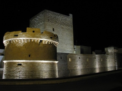 Torrione di Avetrana